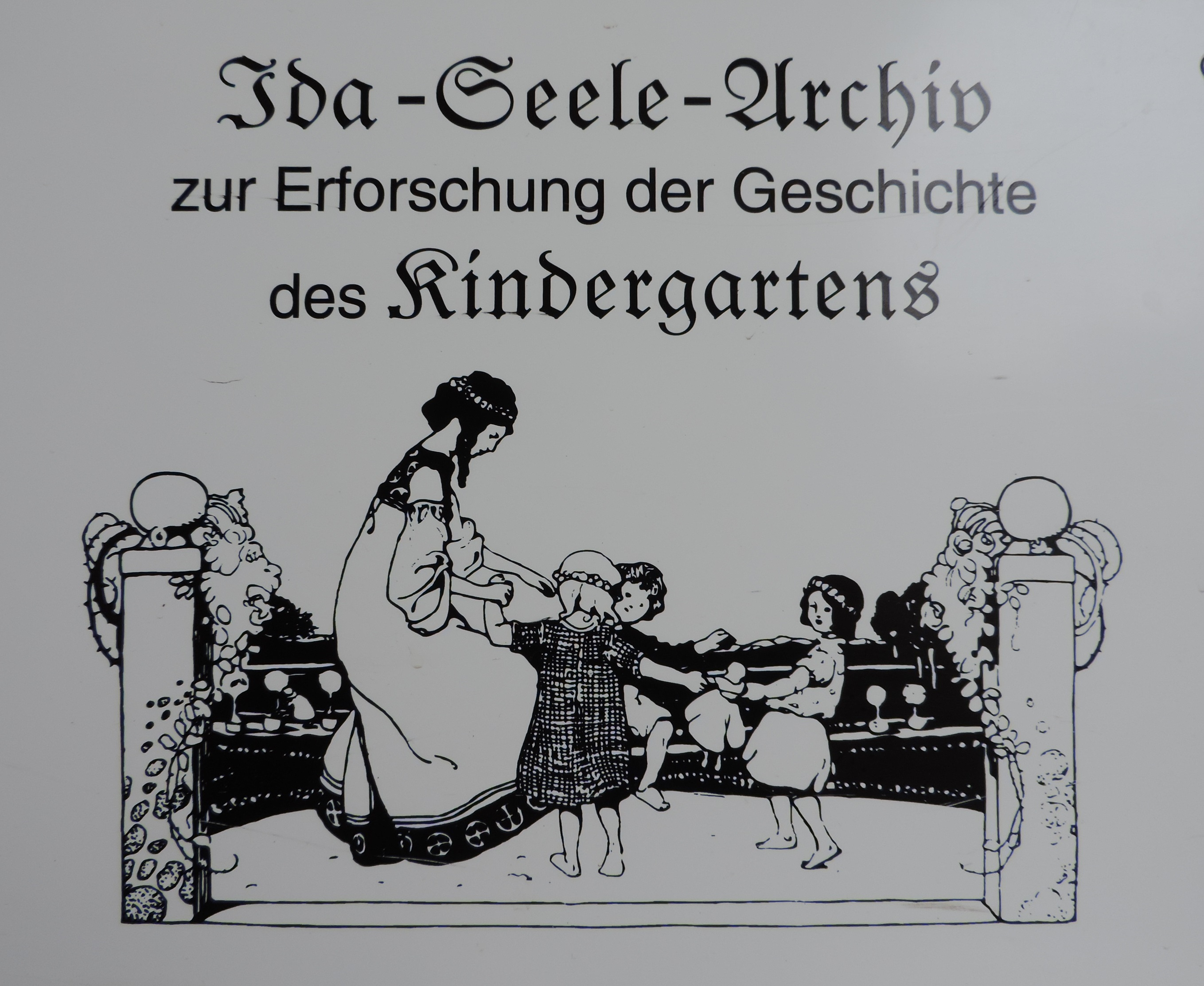 Buchillustration und Logo des Ida Seele Archivs